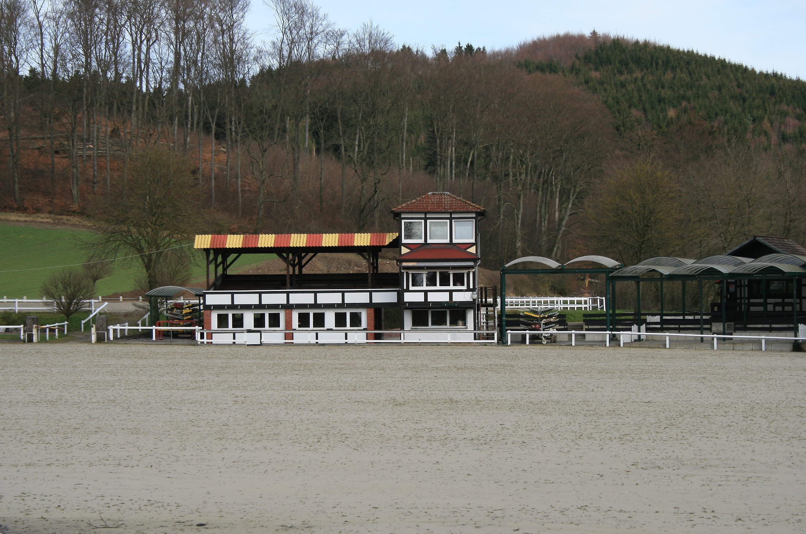 Richterturm mit Meldestelle auf dem Turnierplatz (Springstadion) in Balve-Wocklum.